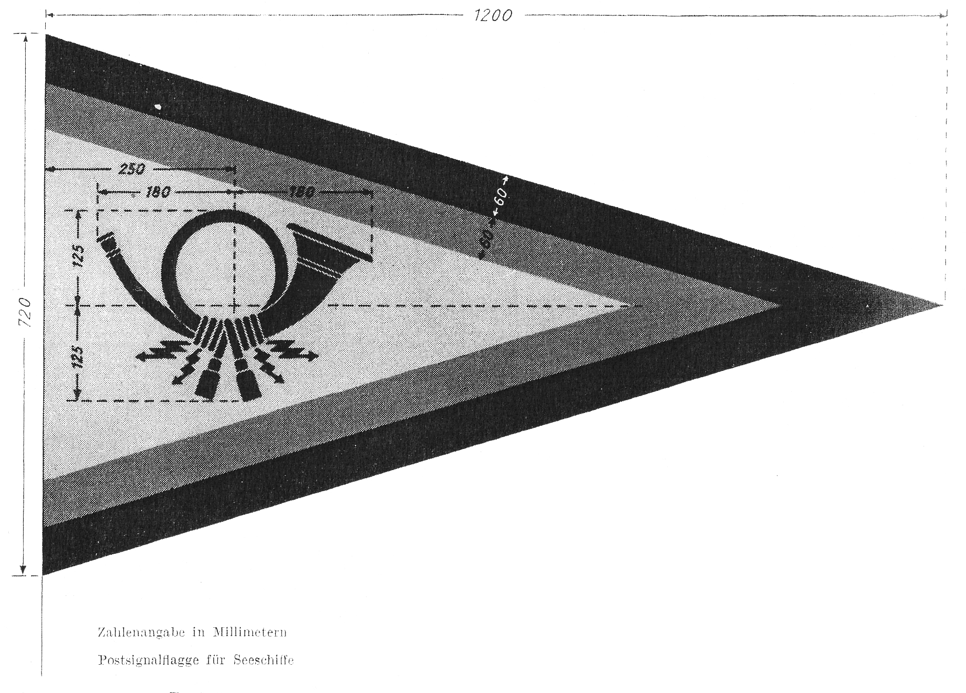 Postsignalflagge der Deutschen Bundespost, Vorlagen-Zeichnung mit Millimeterangaben, aus dem Handwörterbuch des Postwesens, Hrsg. Bundesministerium für das Post- und Fernmeldewesen, 2. völlig umgearbeitete Auflage, Frankfurt am Main, 1953, Seite 557